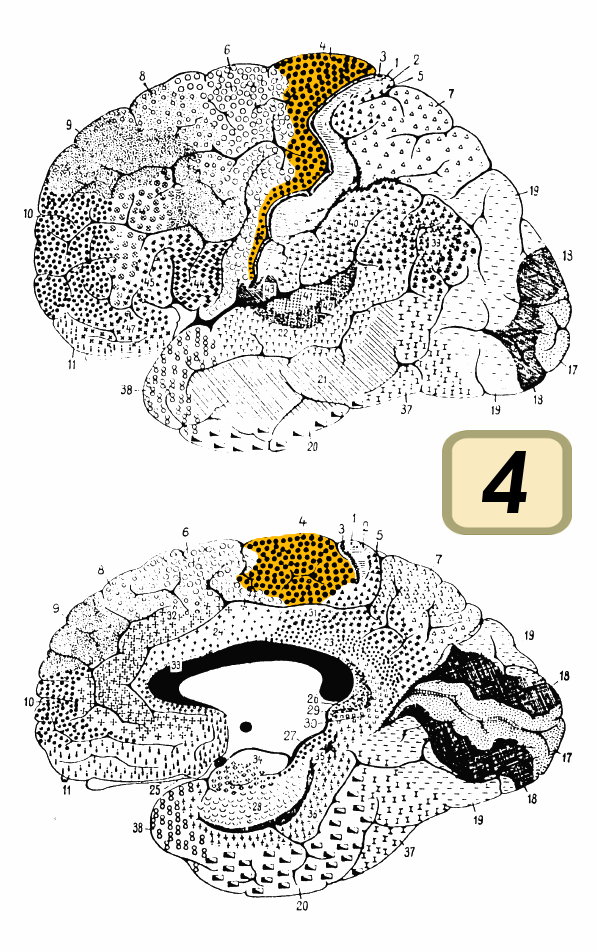 Brodmann area 4.